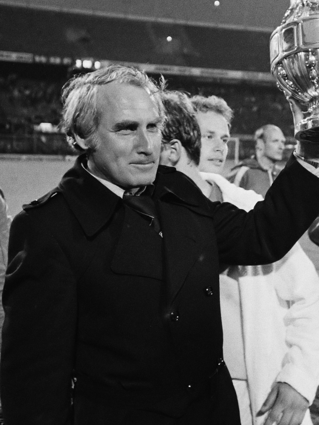 Finale KNVB beker Ajax-FC Twente 3-0; Cor Brom met de beker 29 mei 1979